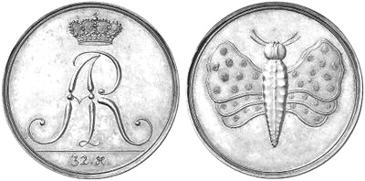 August der Starke, Schmetterlingstaler o.J. (1709)